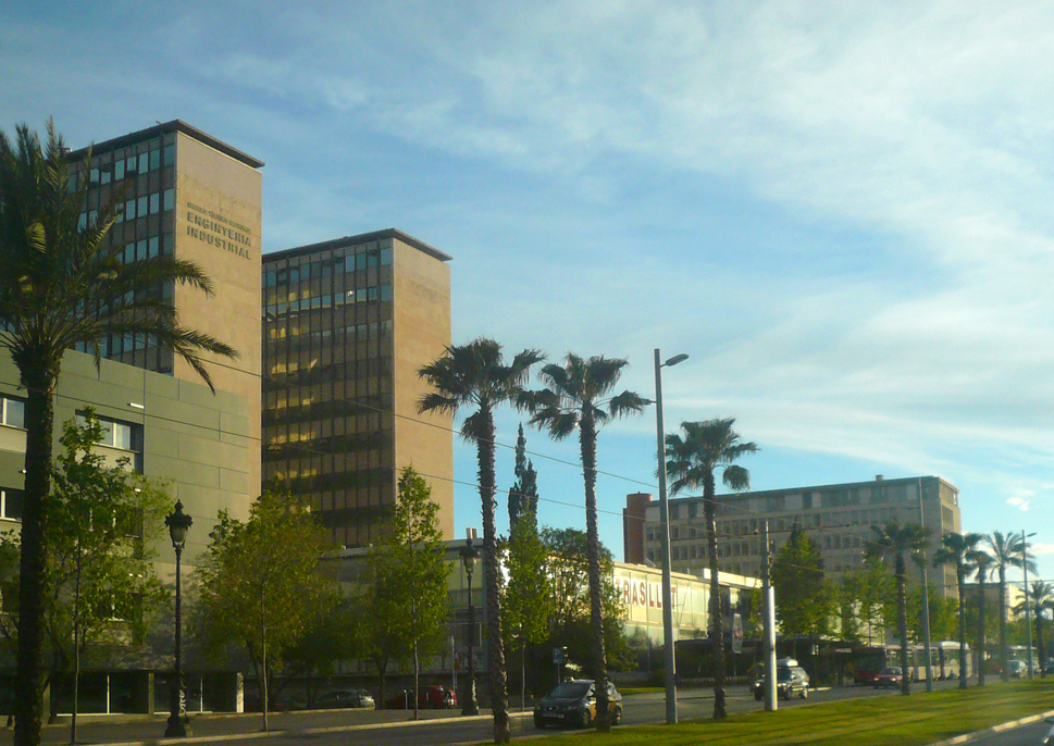 Campus Sud de la Universitat Politècnica de Catalunya, vist des de la Diagonal.